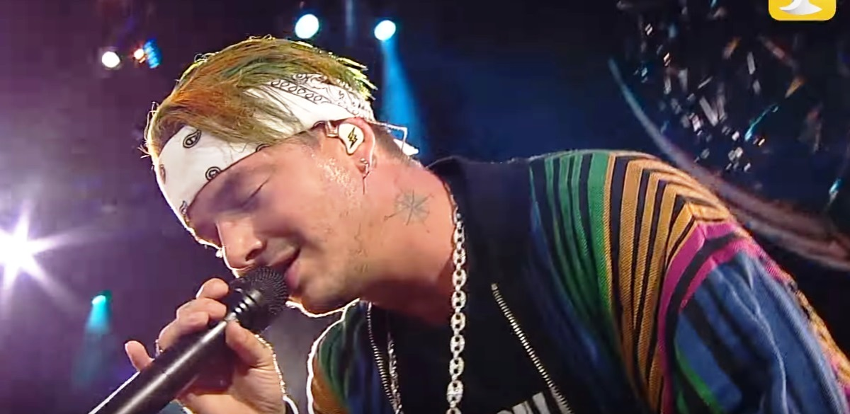 Directamente desde Medellín, Colombia, José Álvaro Osorio Balvin, conocido por su nombre artístico como J BALVIN, se presenta por primera ante el público chileno eligiendo al “monstruo” de la Quinta Vergara como primer jurado de su show, entregando una performance sobre el escenario que mantuvo encendida a las más de 15 mil personas que asistieron a esa noche de cierre del Festival de Viña 2017.